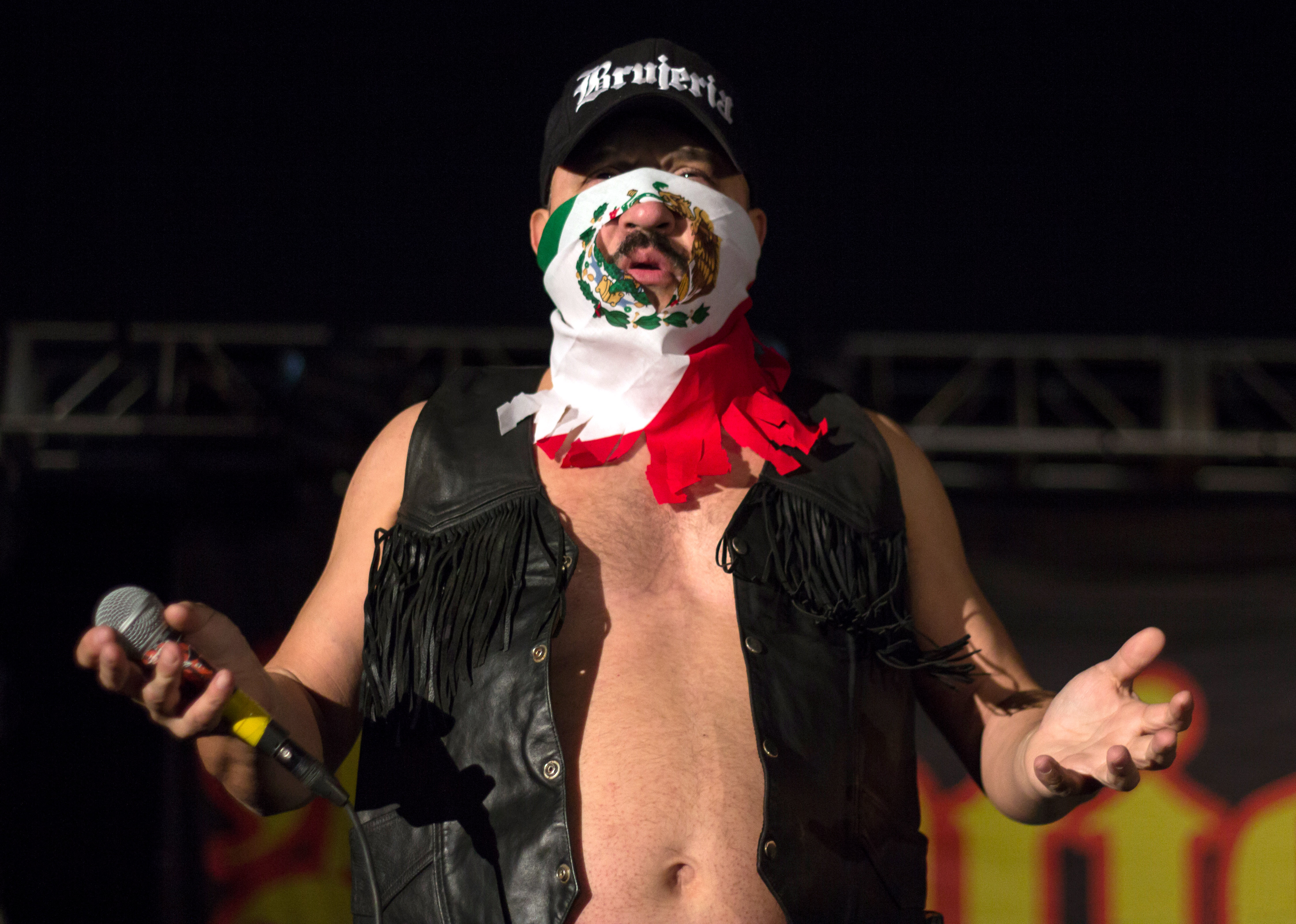 JUAN BRUJO EN CARPA ASTROS, CIUDAD DE MÉXICO, NOVIEMBRE 2017